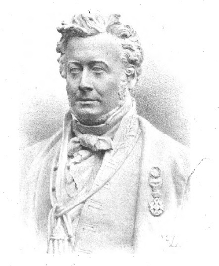 Portrait du Dr Joseph Guislain, (avec sa médaille d'Officier de l'ordre de Léopold). Dessin d'un buste en marbre réalisé par Antoine Van Eenaeme, à la demande du Gouvernement belge (A-R du 11 avril 1860.) en vue d'être placé à l'Académie Royale de Médecine. Pièce réceptionnée en 1862.